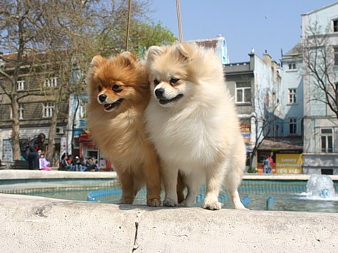 помераните са най-малкия по вид размер на кучето!